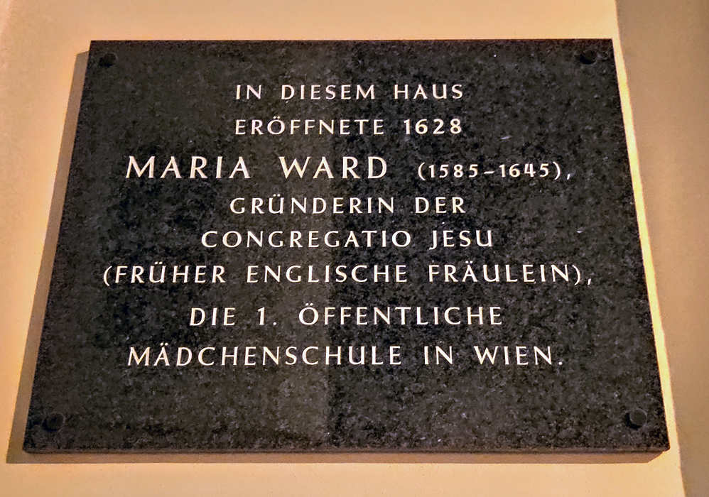 Gedenktafel am Haus am Stoss im Himmel 3, in dem Maria Ward die erste öffentliche Mädchenschule Wiens gegründet hat.